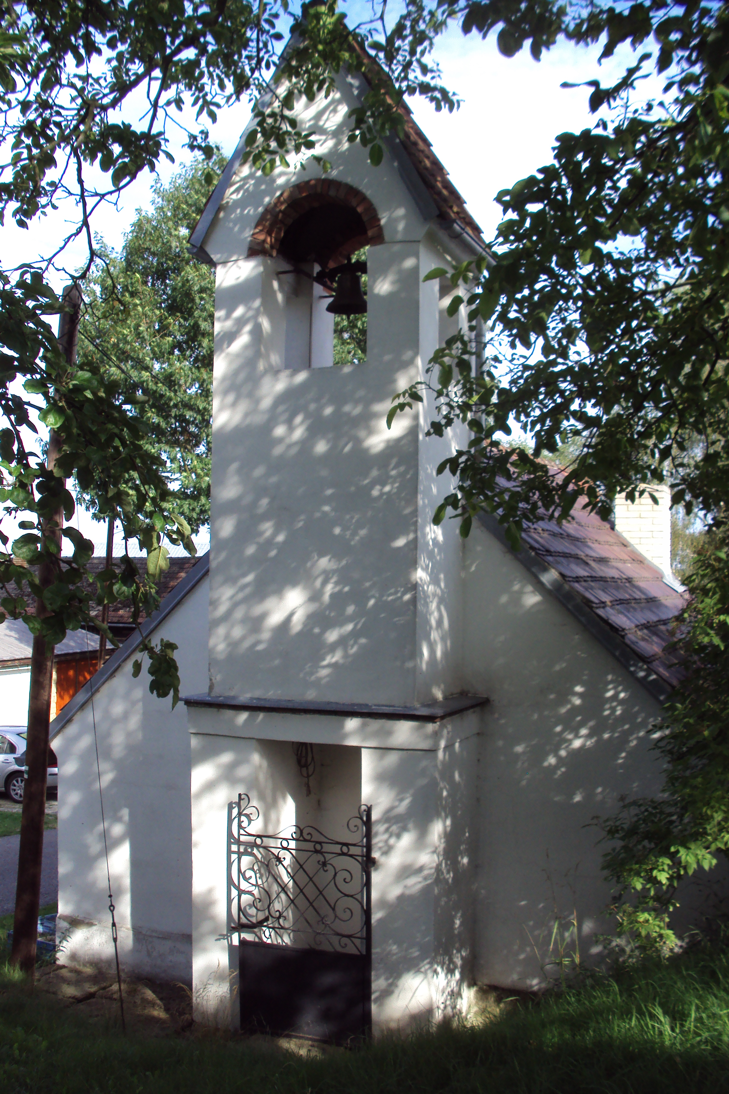 Zvonice, snad kdysi hasičárna